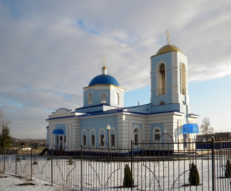 Храм Рождества (Шаталовка, Белгородская обл.)